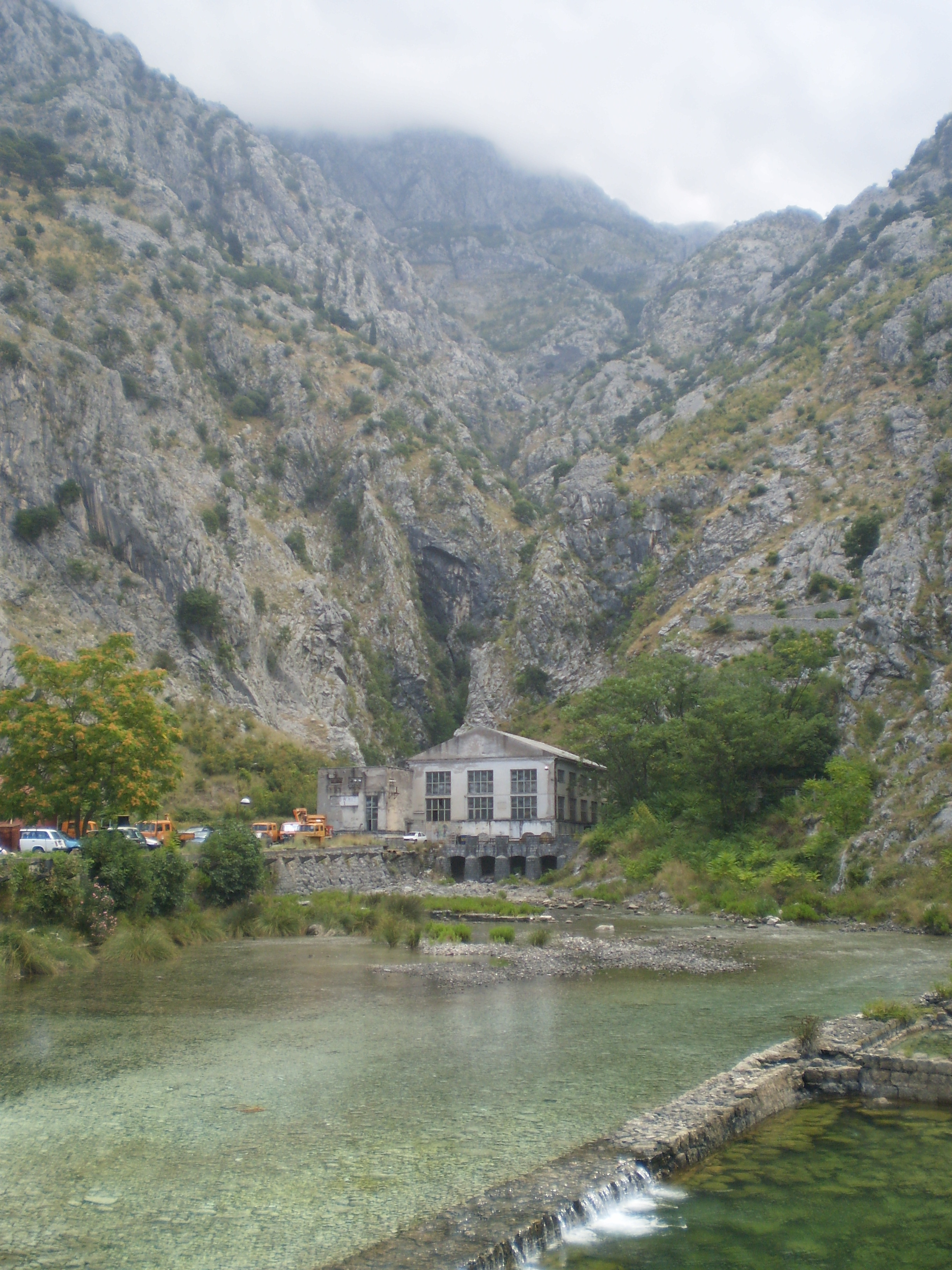 Српски (ћирилица): Врело Шкурда у Котору